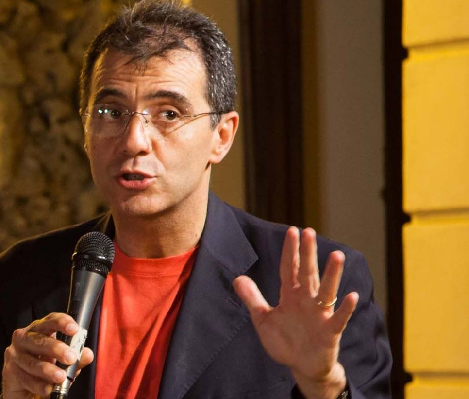 il Giornalista e Dirigente Sportivo italiano Giusva Branca